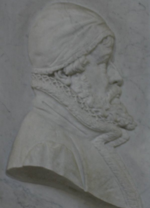 Anders Sørensen Vedel, Danish historian